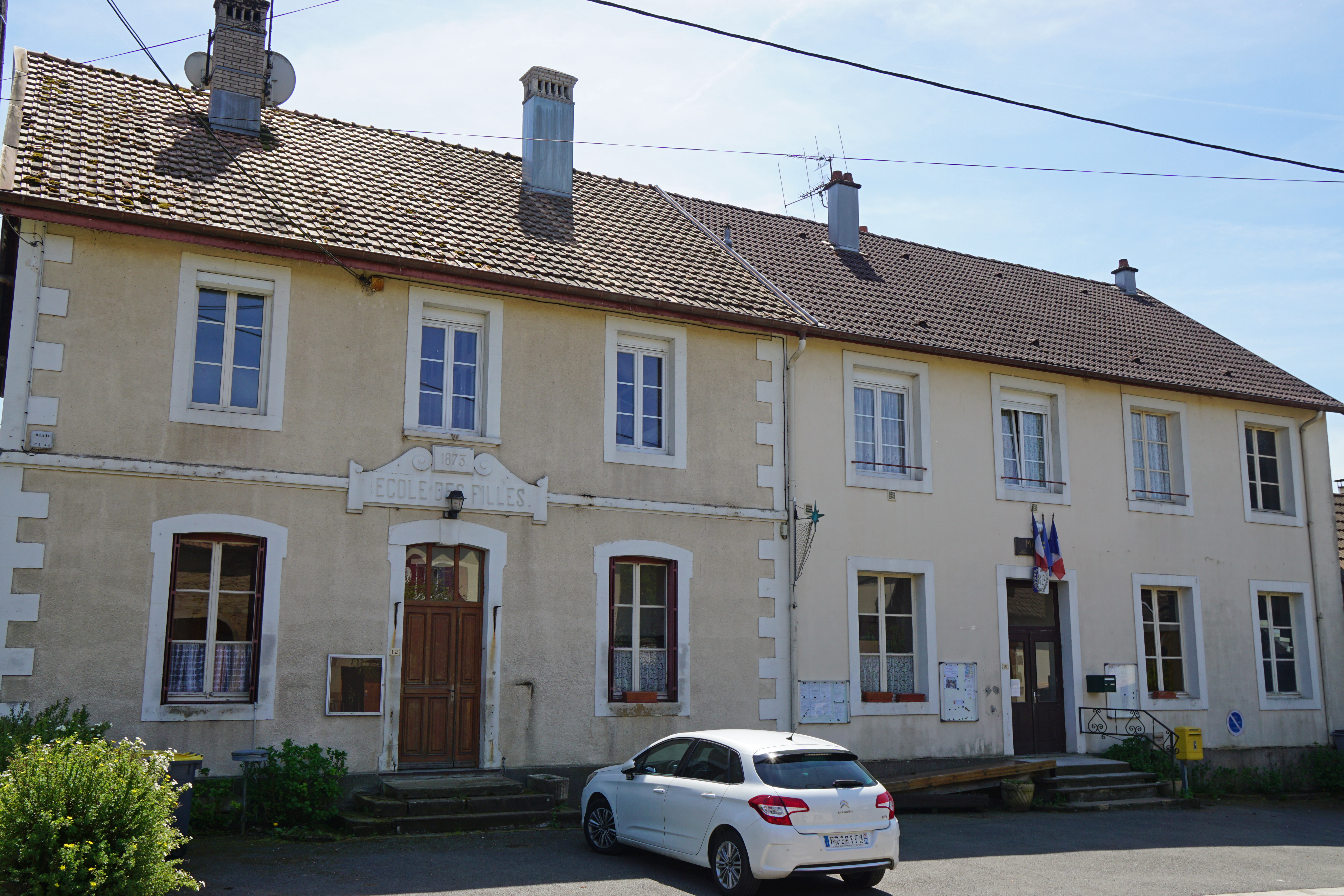 Mairie de Granges-la-Ville.